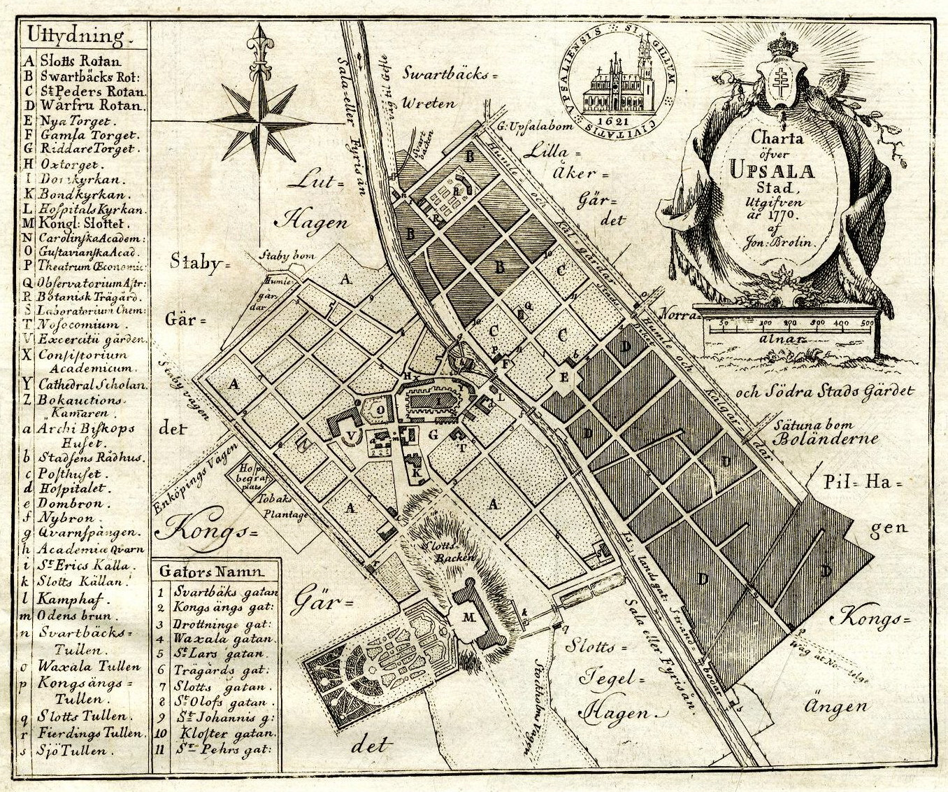 Charta öfver Upsala stad, utgifven år 1770 af Jon: Brolin.